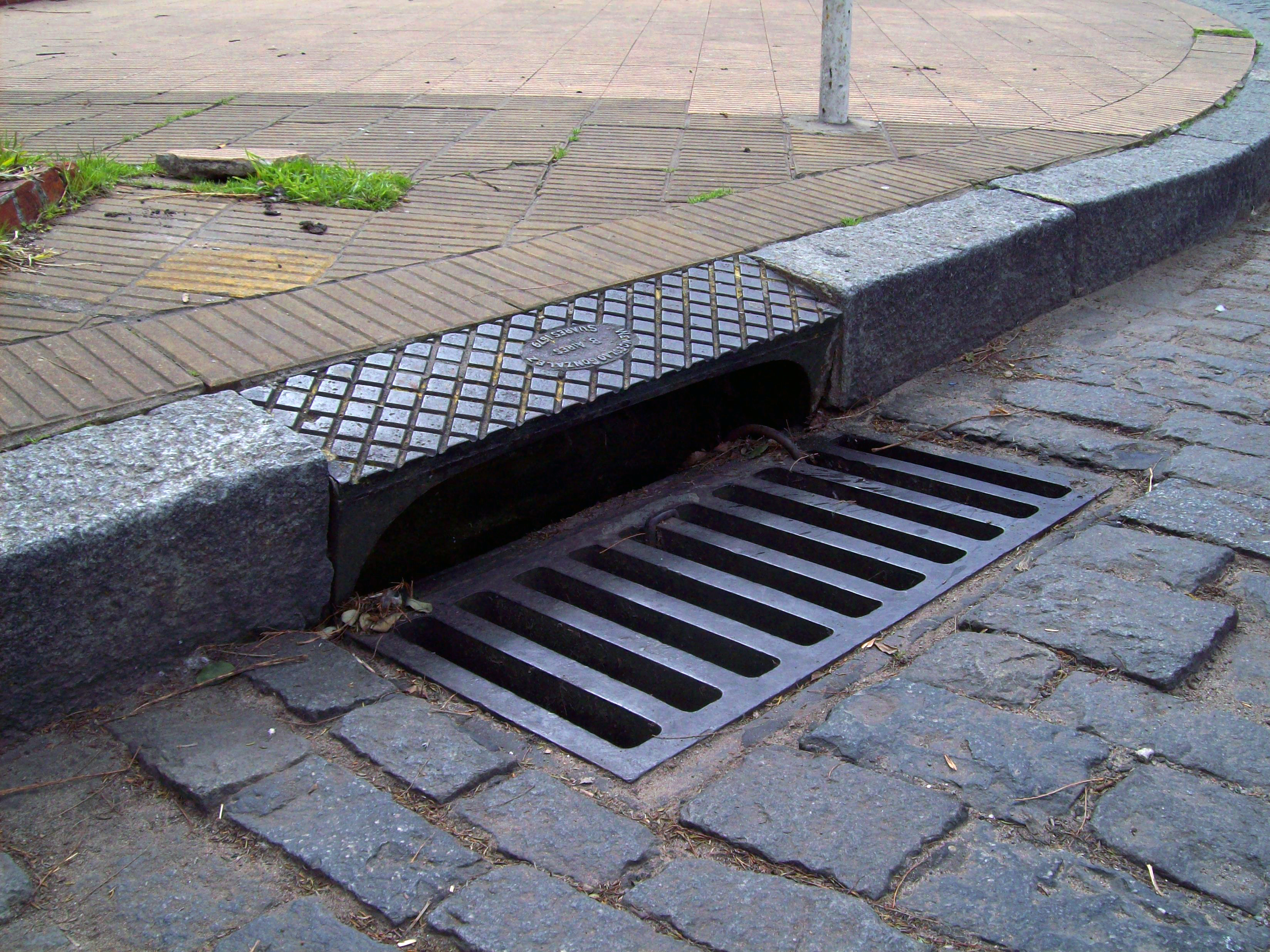 Alcantarilla en la ciudad de Buenos Aires.